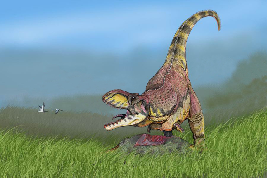 Rajasaurus narmadensis